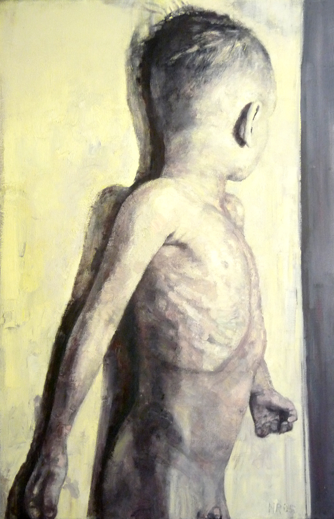 Heike Ruschmeyer, Monolog CXL, 2005, Öl auf Leinen, 210 x 136 cm